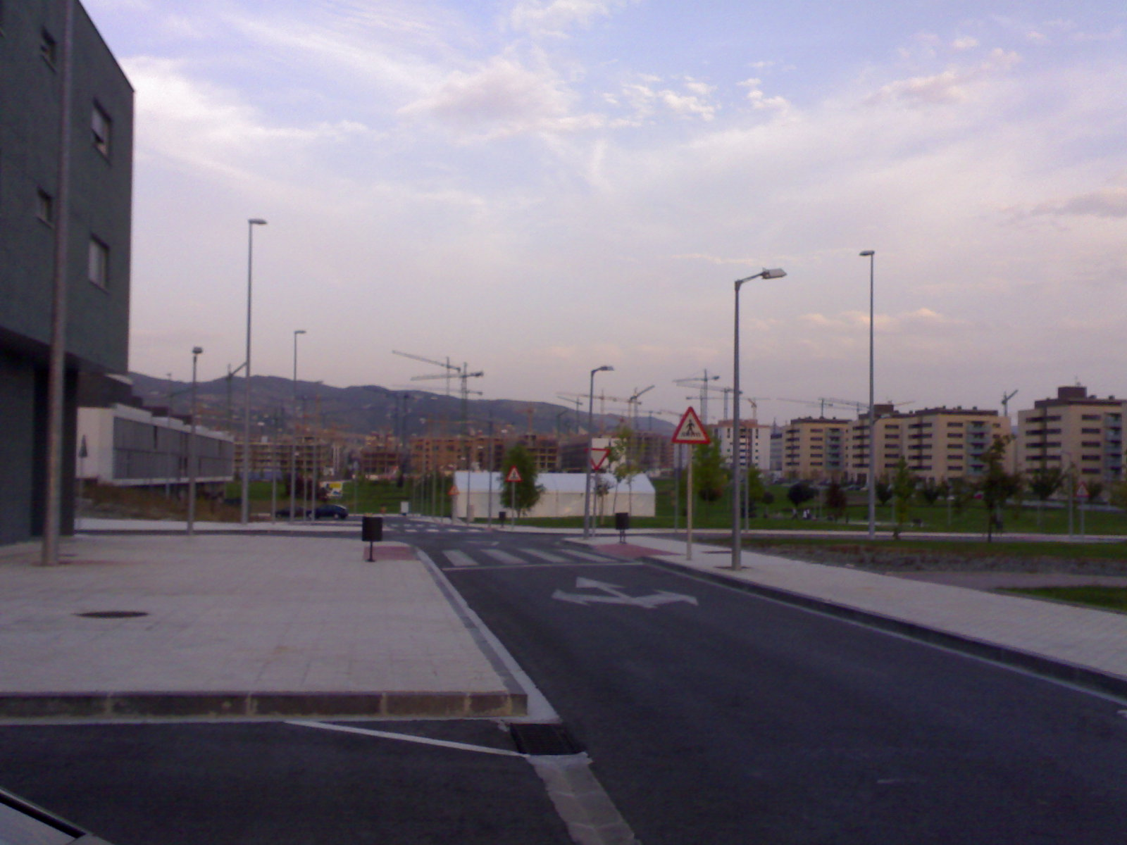 Sarrigurengo auzo berriaren eraikitzea.